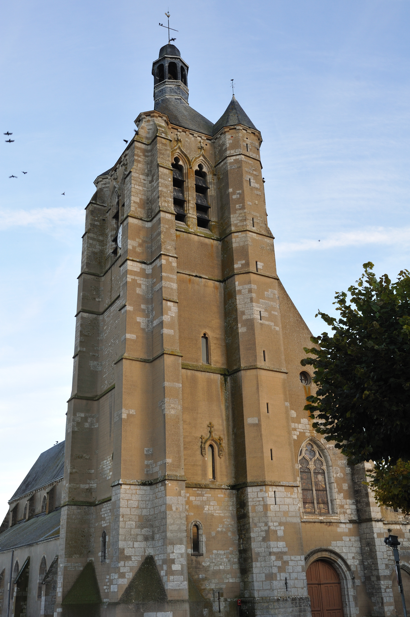 Église Saint-Symphorien, Neuville-aux-Bois, Loiret, France